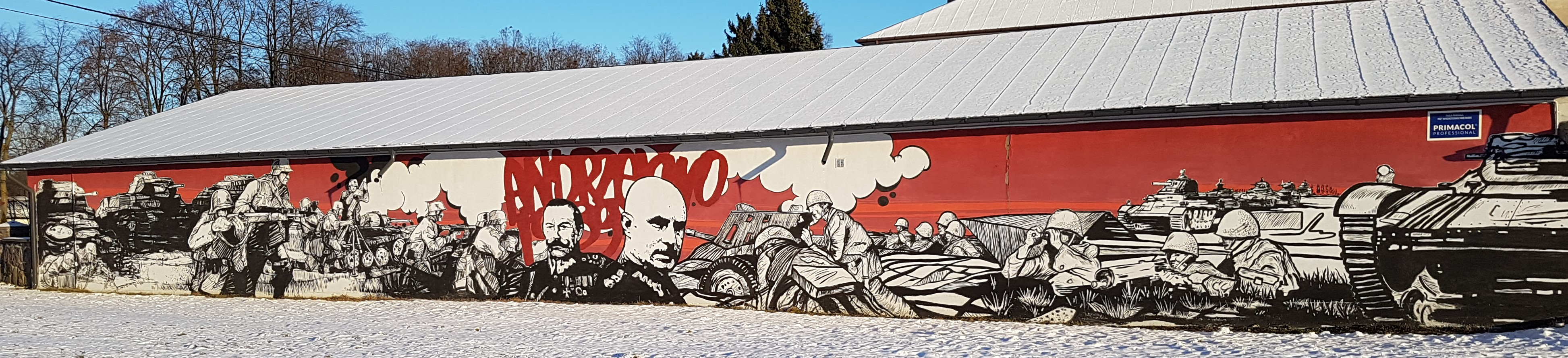 Mural odnosi się przede wszystkim do wydarzeń z 12 i 13 września 1939 r. jakie miały miejsce na polach Andrzejewa. W centralnym punkcie znajdują się postacie ostatnich dowódców "Żelaznej Dywizji": pułkownika Stefana Koseckiego ciężko rannego w bitwie oraz pułkownika Aleksandra Hertla, który poległ w nocnym natarciu na przedpolu Andrzejewa i spoczywa w pobliskim Mauzoleum 18 DP.